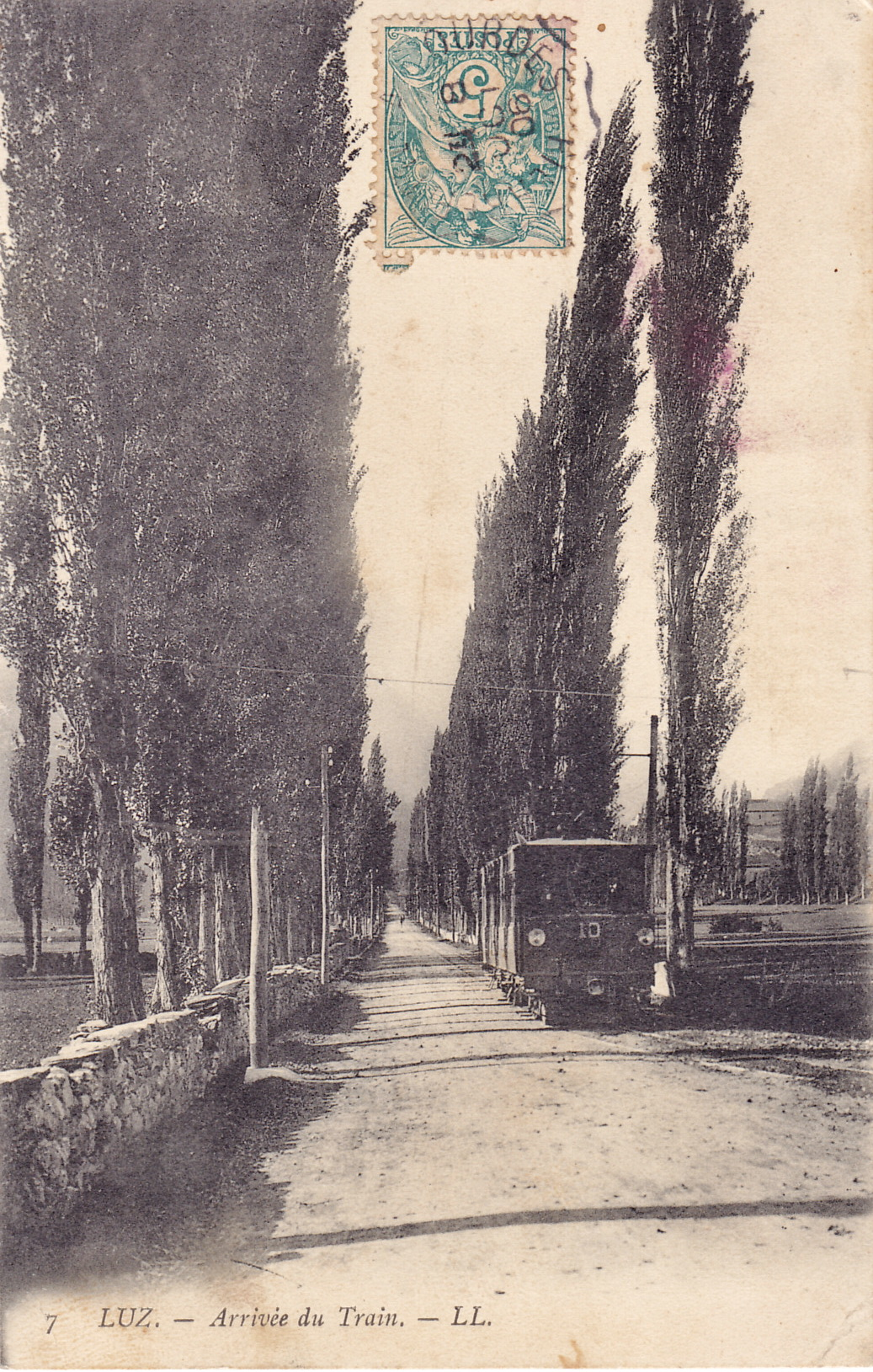 Carte postale ancienne éditée par LL, n°7 :LUZ - Arrivée du Train